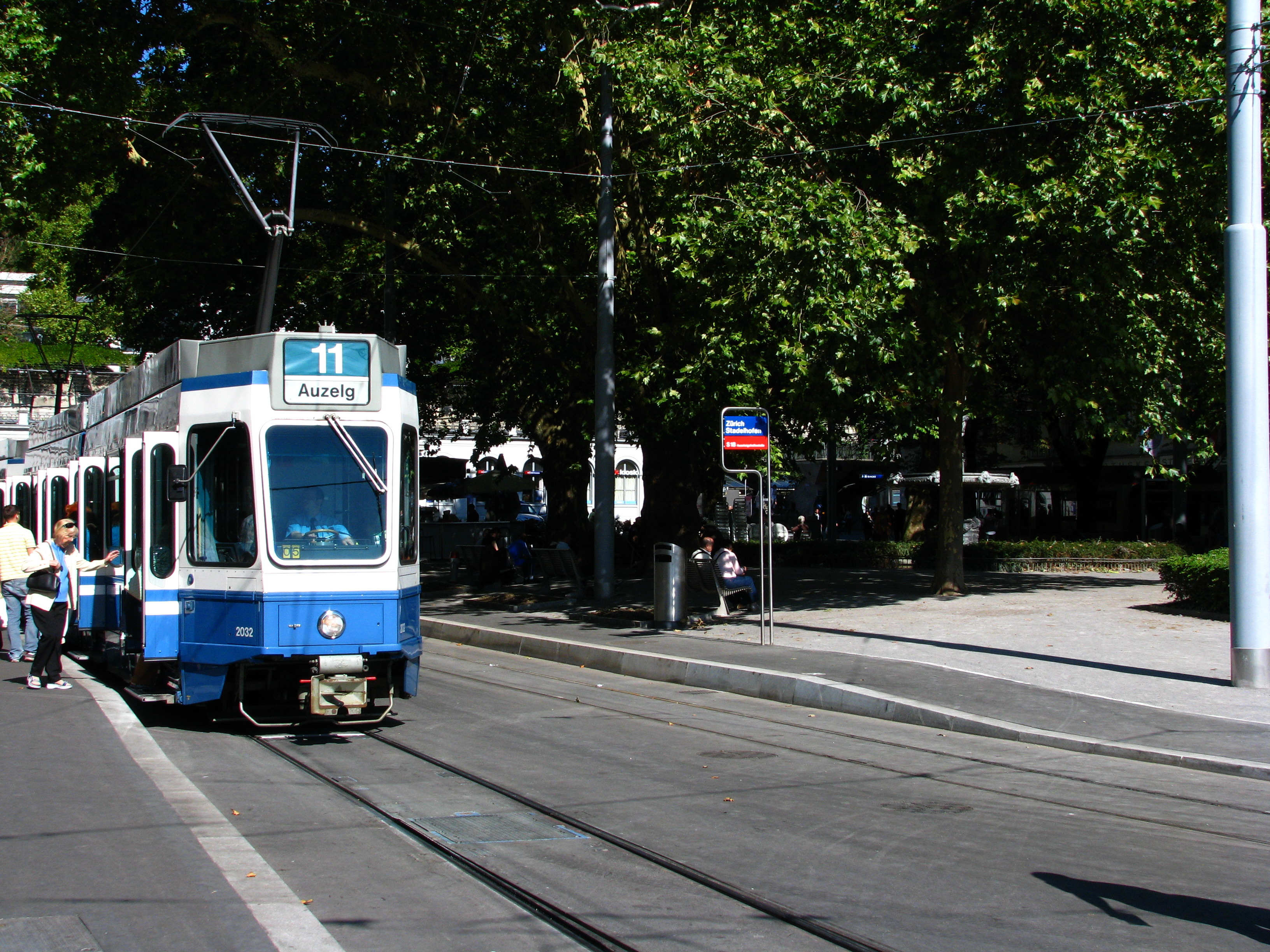 Stadelhoferplatz near Bahnhof Stadelhofen in Zürich (Switzerland)